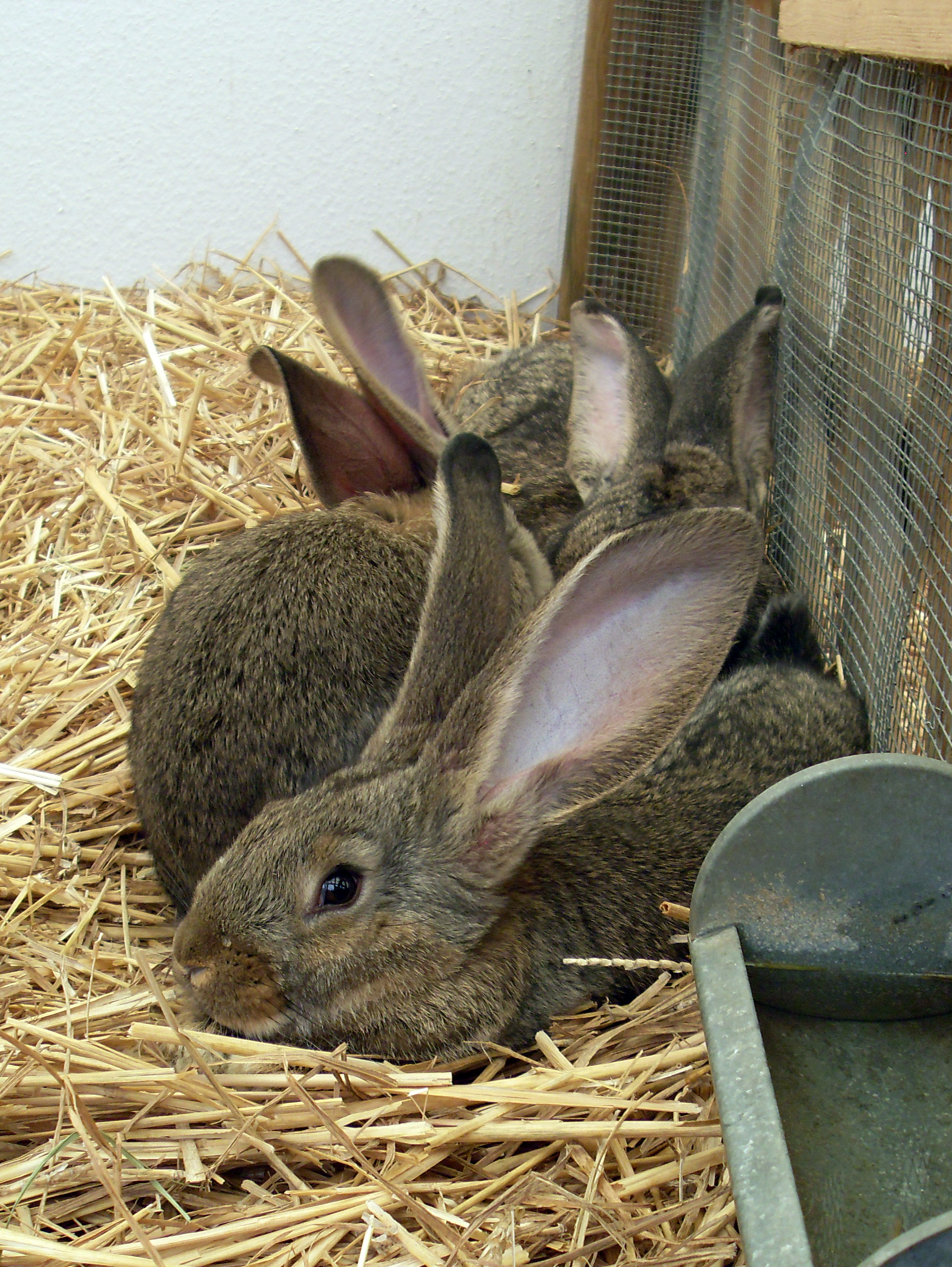 Deutsche Riesen